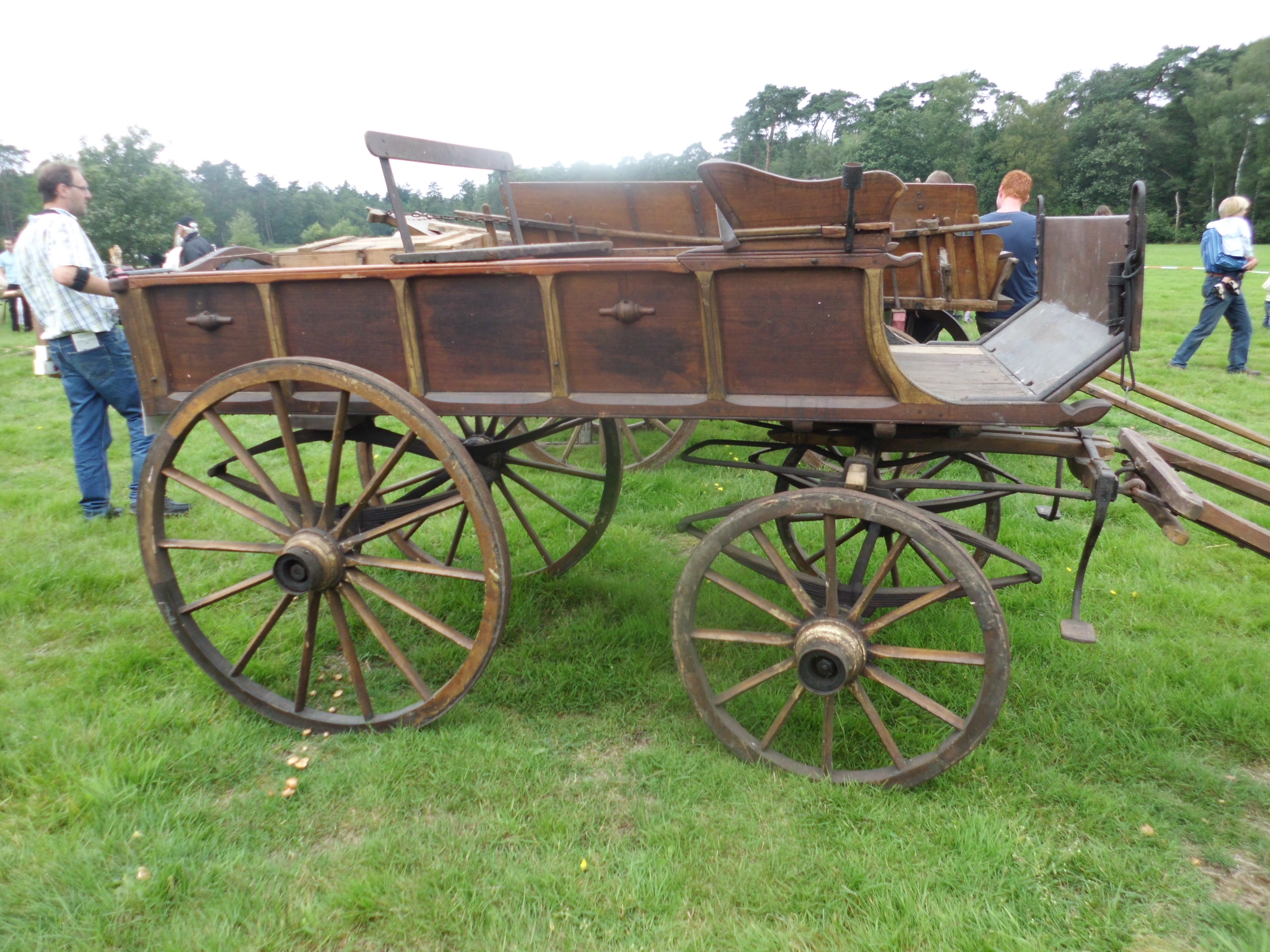 Boerenwagen, model Brik